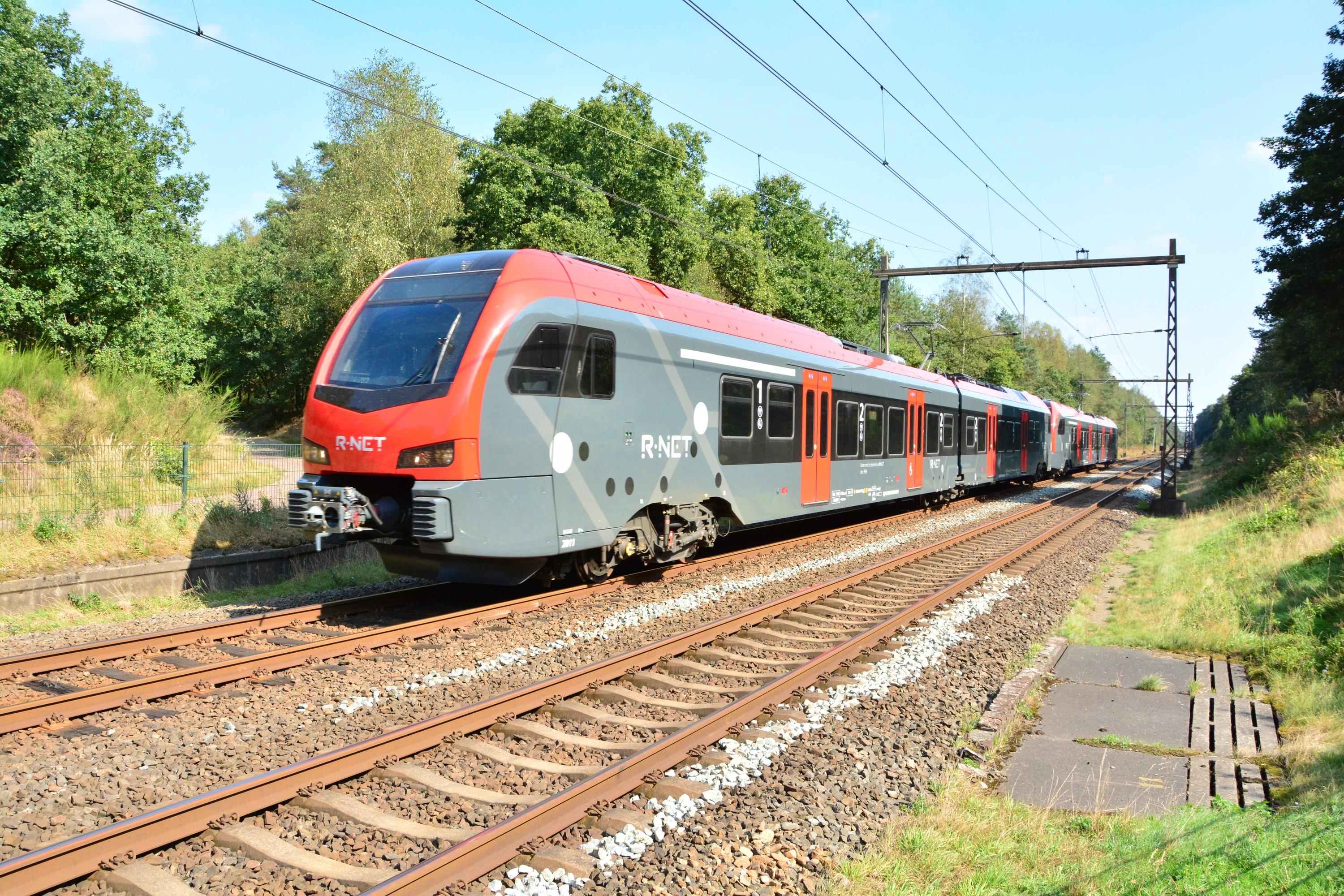 NS R-Net Flirt 2011 en 2012 passeren overweg Asselsepad nabij Apeldoorn